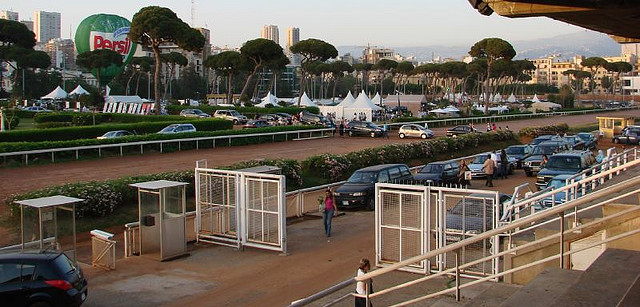 Nei giardini dell'Ippodromo di Beirut si e' svolta la manifestazione "The Garden Show & Spring Festival" - Esposizioni di piante - mobili - oggetti per il giardino - prodotti biologici. Alla manifestazione hanno partecipato anche numerose associazioni che operano nel sociale esponendo cosi' i prodotti dei laboratori per disabili o pubblicizzando l'attivita per la tutela dell'ambiente .